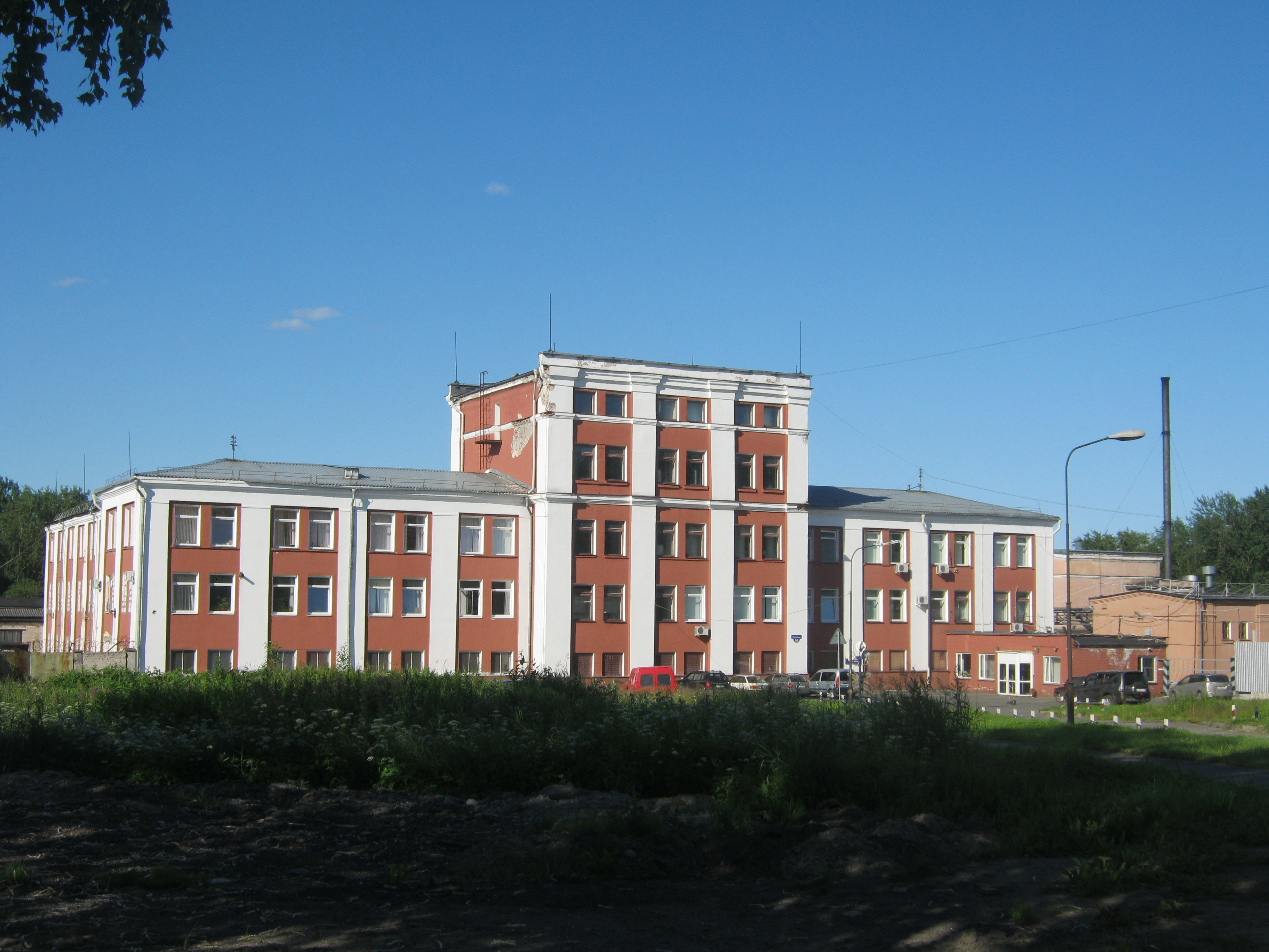 Промышленность Петрозаводска